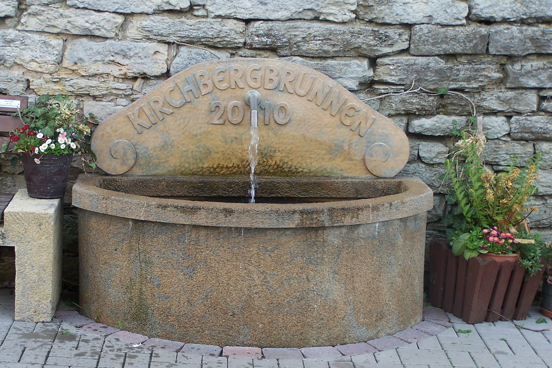 Der im Jahr 2010 neu gefasste Kirchbergsborn in der Oberen Gasse in Kaltenlengsfeld.